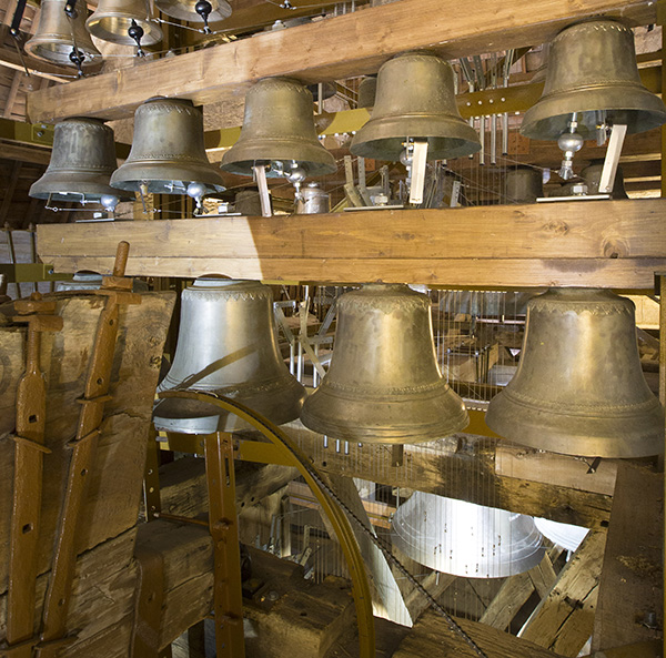 Carillon